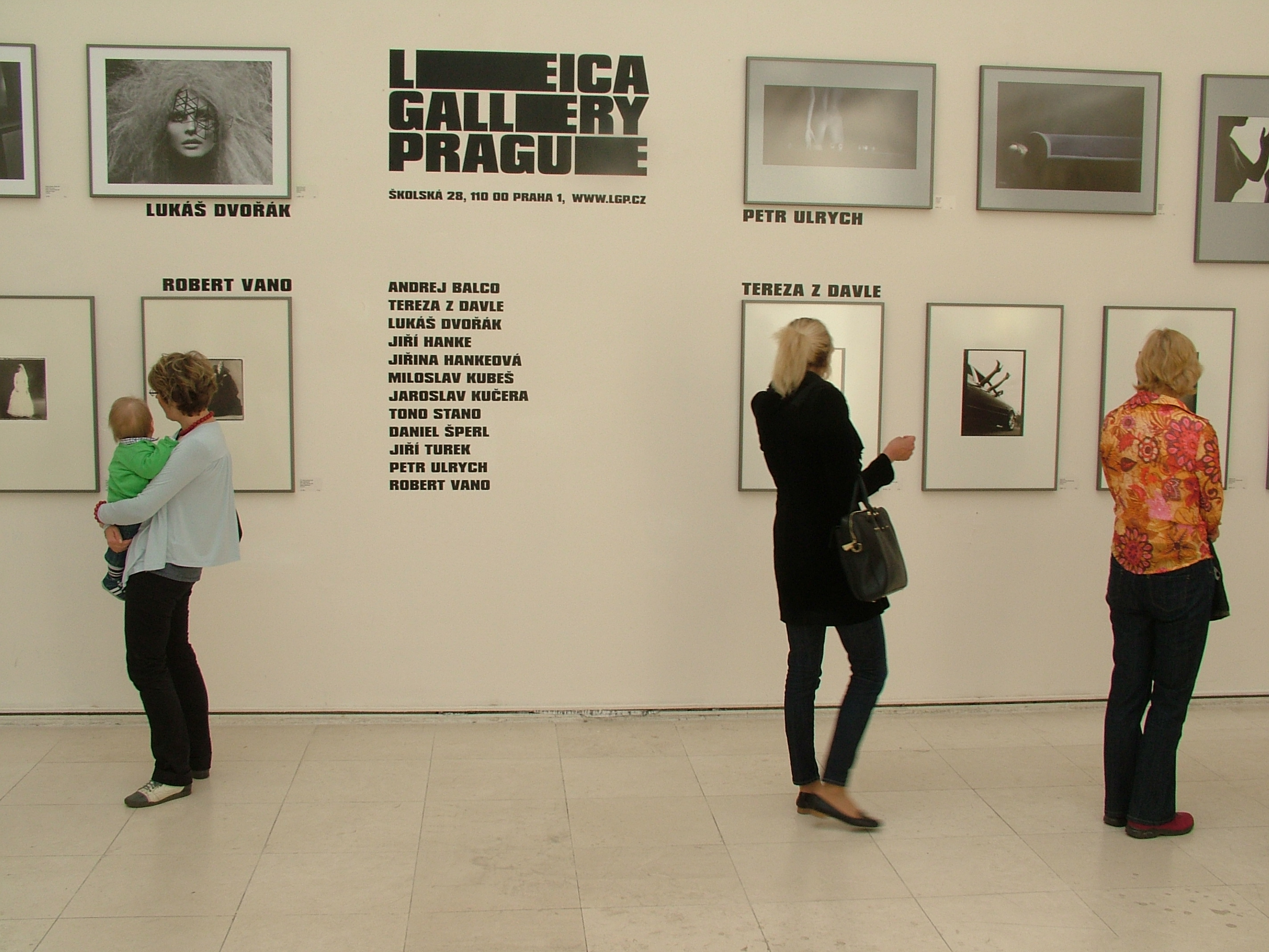 Výstava, festival, Prague Photo 2011 Budova: Mánes, Praha Trvání: od 4. dubna do 10. dubna 2011. Datum: 10. dubna 2011.